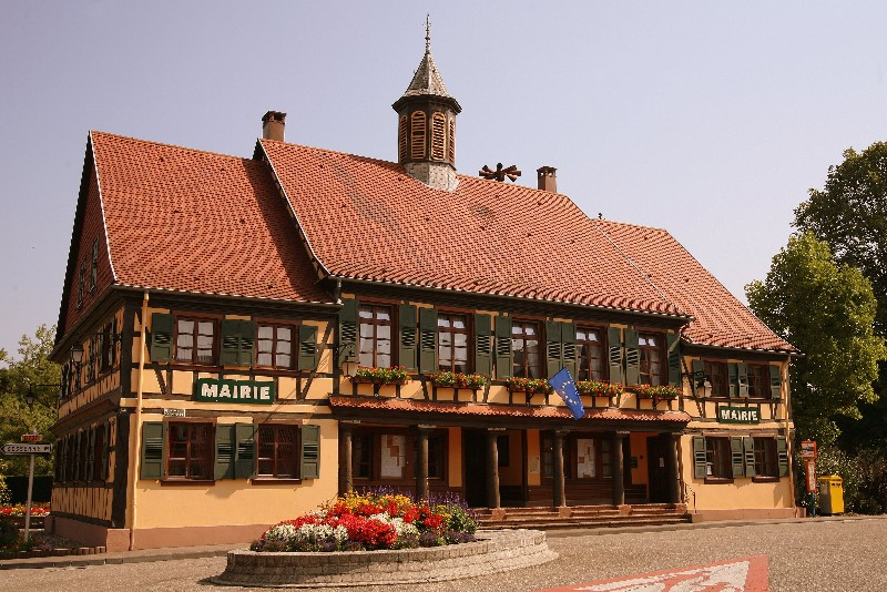 Lieux et monuments Mairie de Dalhunden